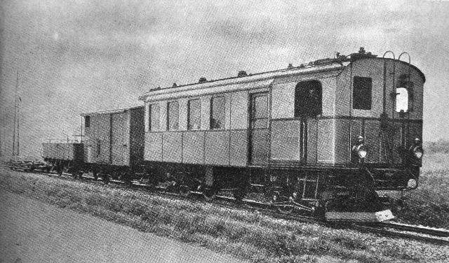 CFm 2/4 Nr. 1 der Biel-Meinisberg-Bahn zwischen Safnern und Meinisberg. Im Güterzug sind zu sehen: Gedeckter Güterwagen K 21, Offene Güterwagen L 31 und ein Rollschemel O1. Auf dem Bild ist somit bis auf zwei weitere Rollschemel alle Güterwagen der Bahn zu sehen.